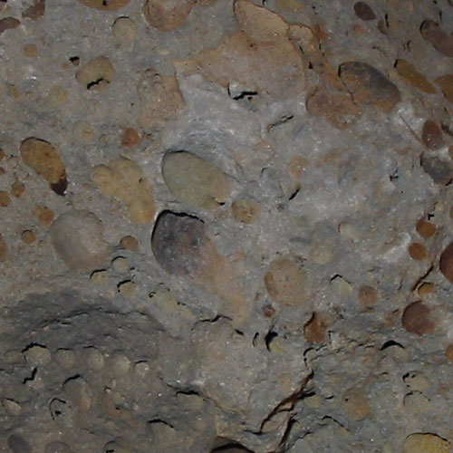 Gaaside eraldumisest tekkinud poorid laavas